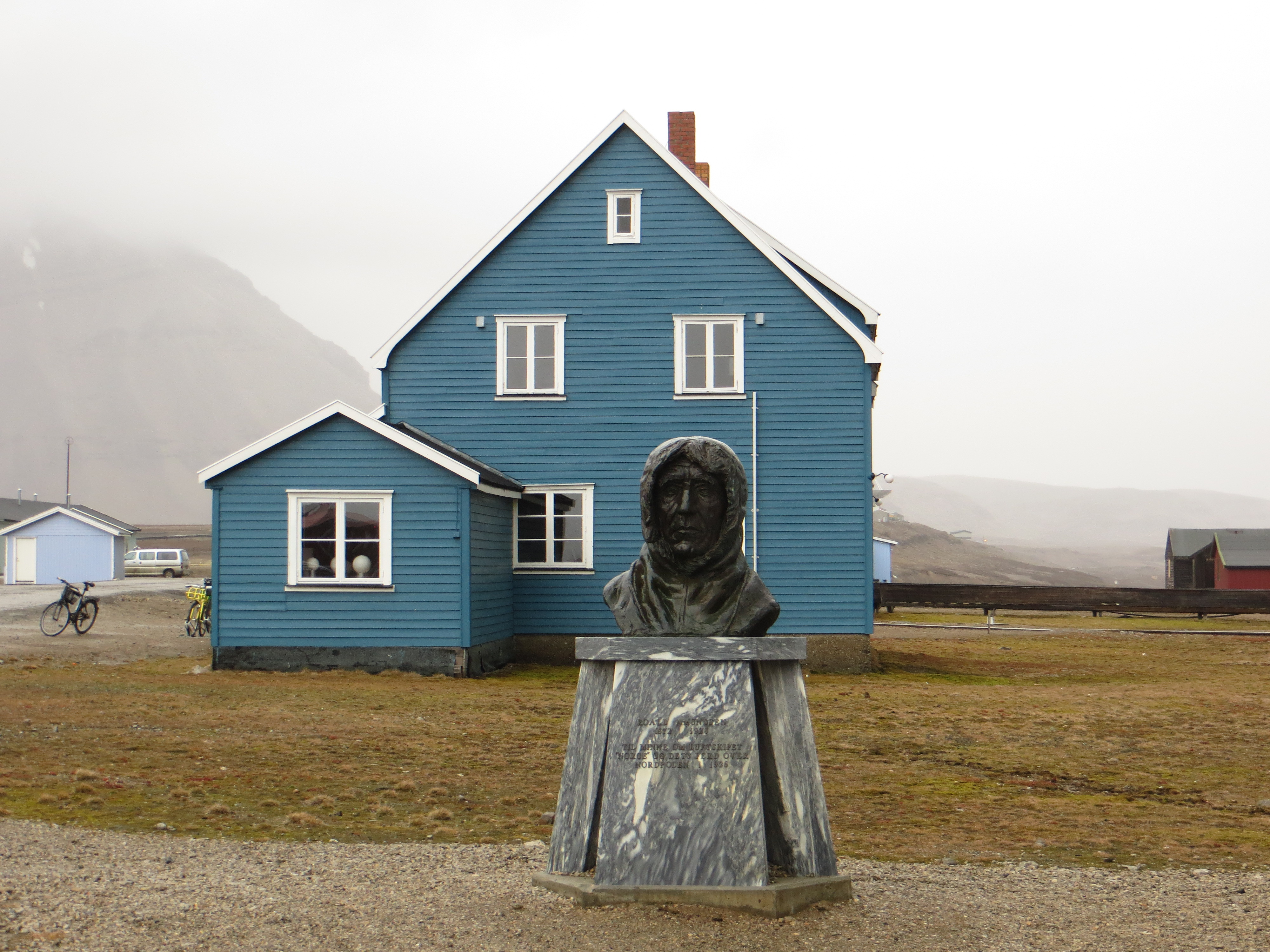 Estátua em homenagem ao famoso explorador norueguês Roald Amundsen